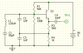 Clapp Oszillator Schaltung